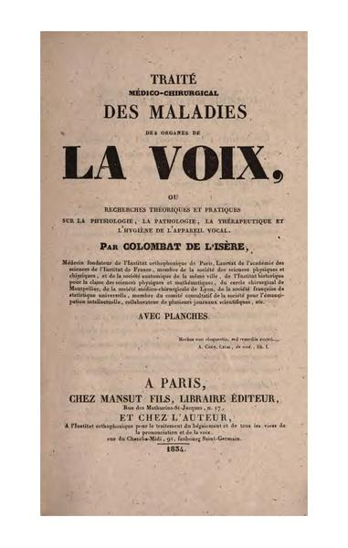 Ytaité Colombat